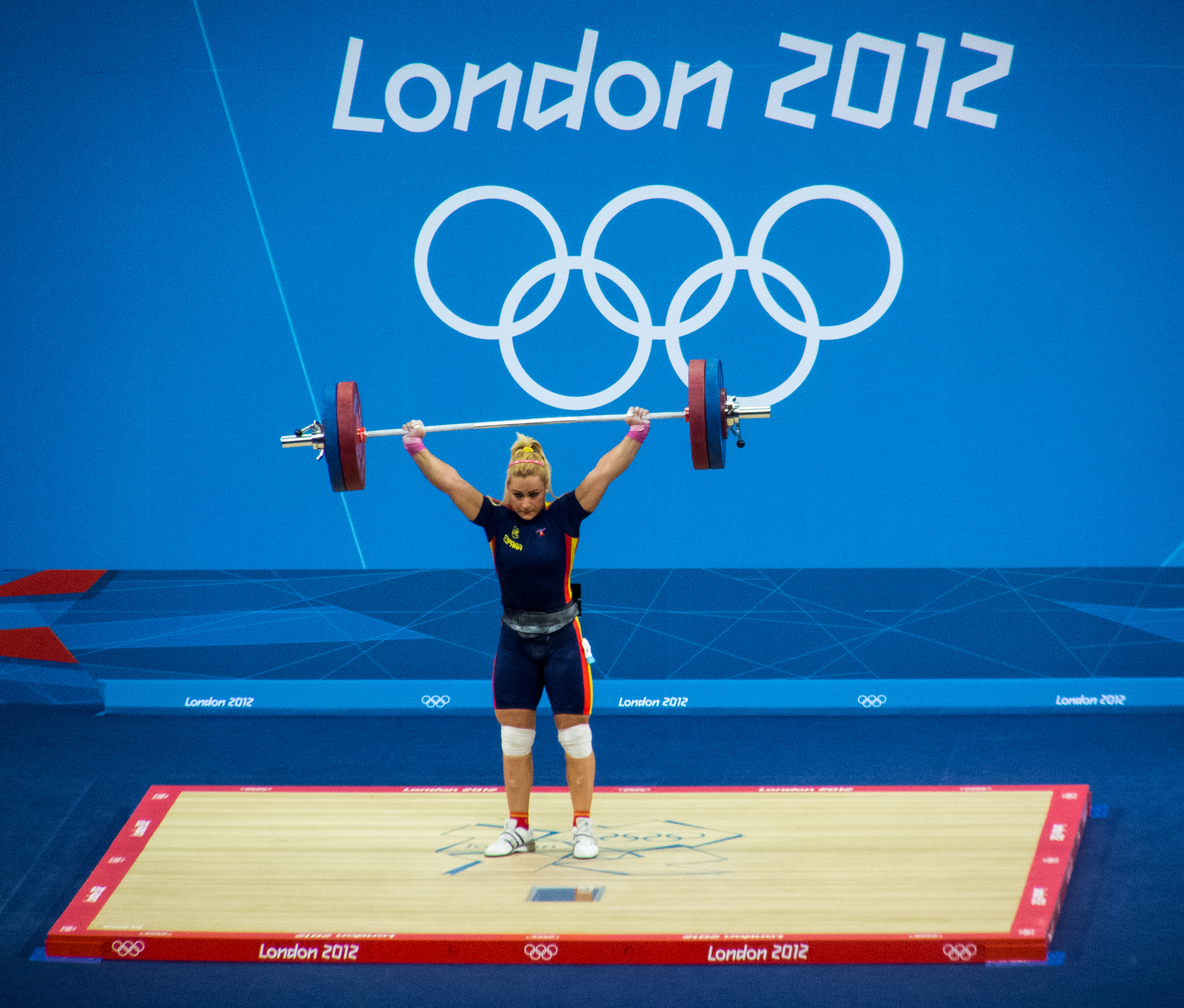 Lidia Valentín, 2012 Olympics